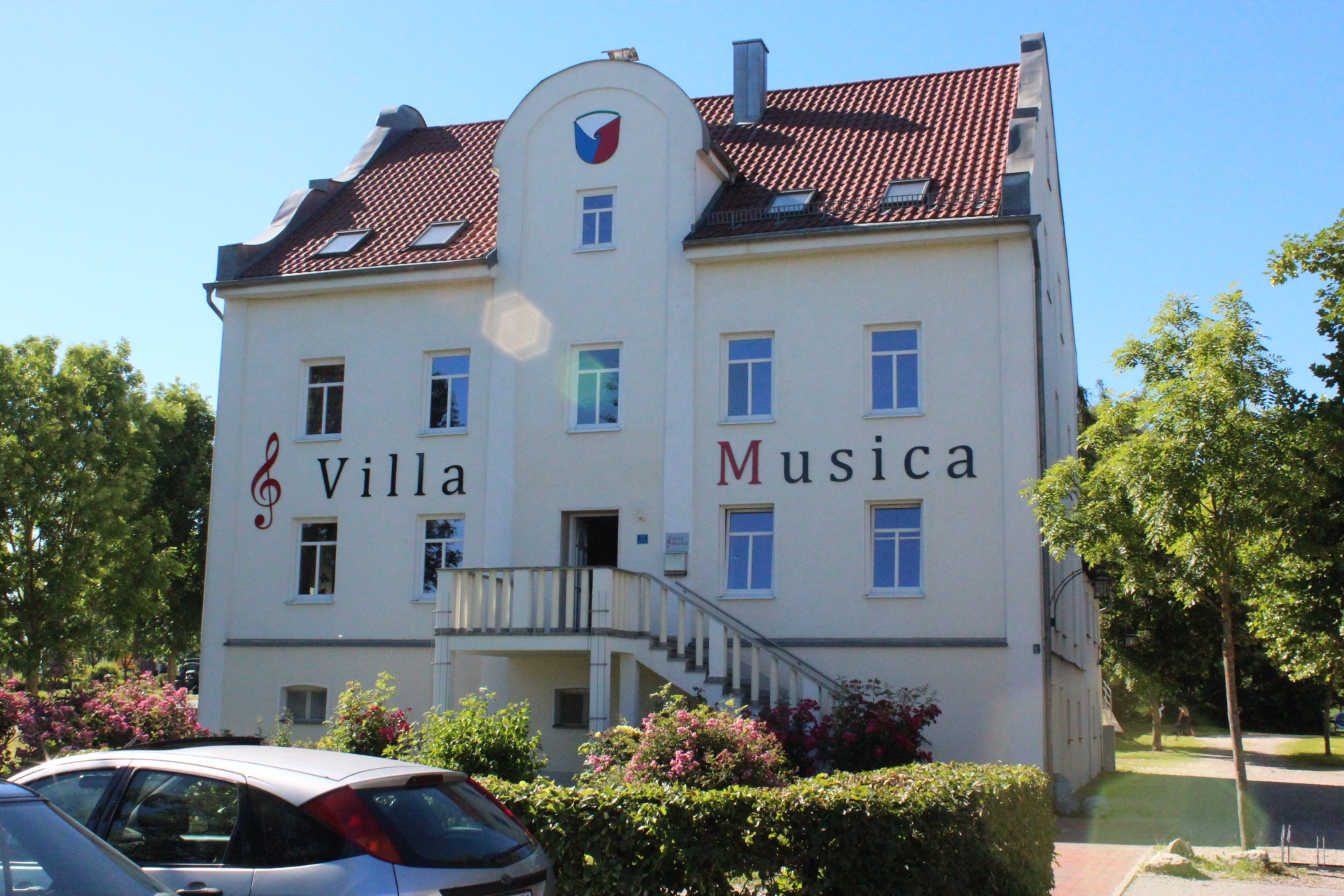 'Villa Musica', die Musikschule der Gemeinde Altdorf bei Landshut.